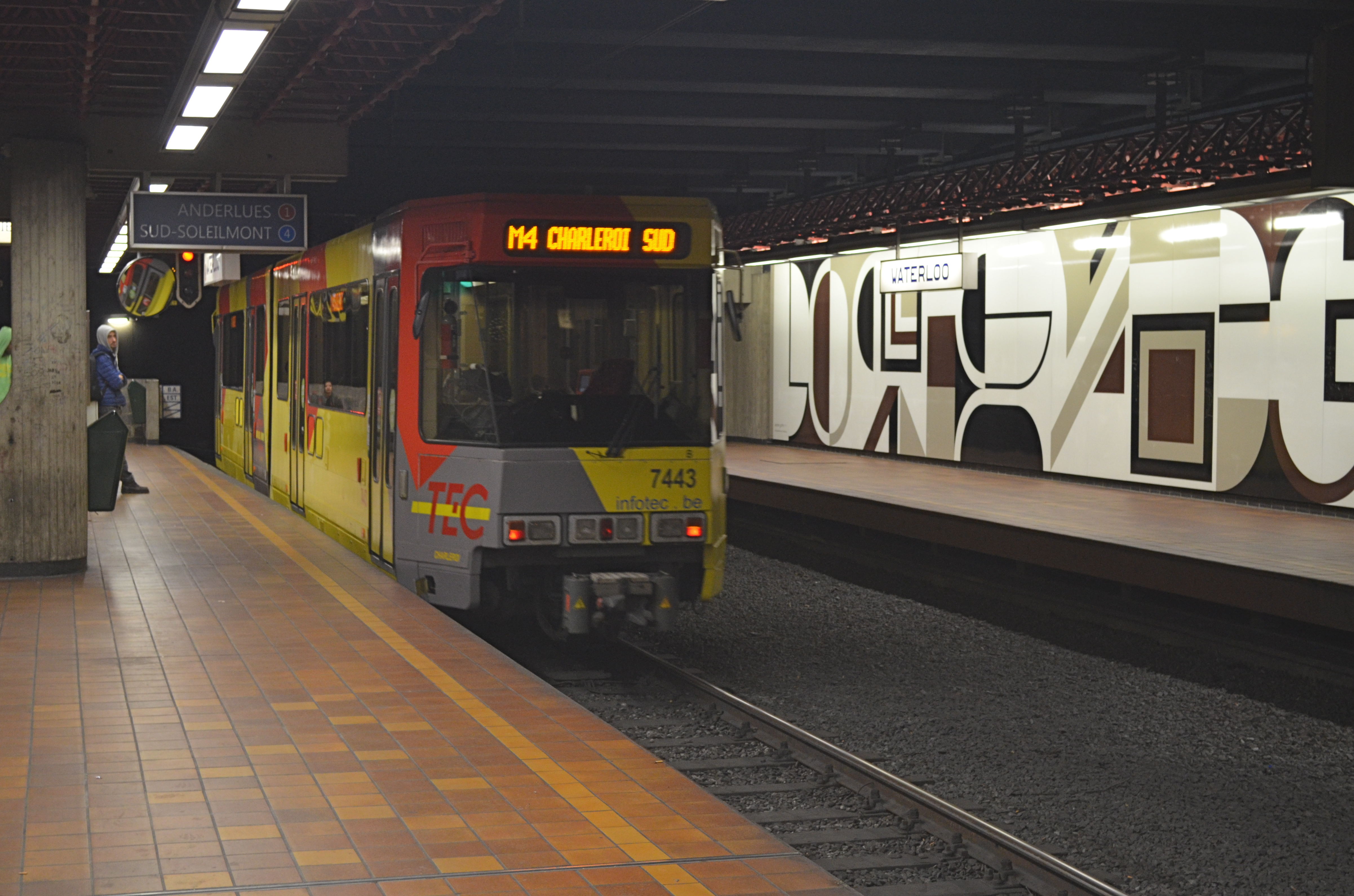 Véhicule de la ligne 4 du métro léger de Charleroi quittant la station Waterloo en direction de la station Beaux-Arts. Sur le mur, une peinture de André Goffin réalisée en 1980.